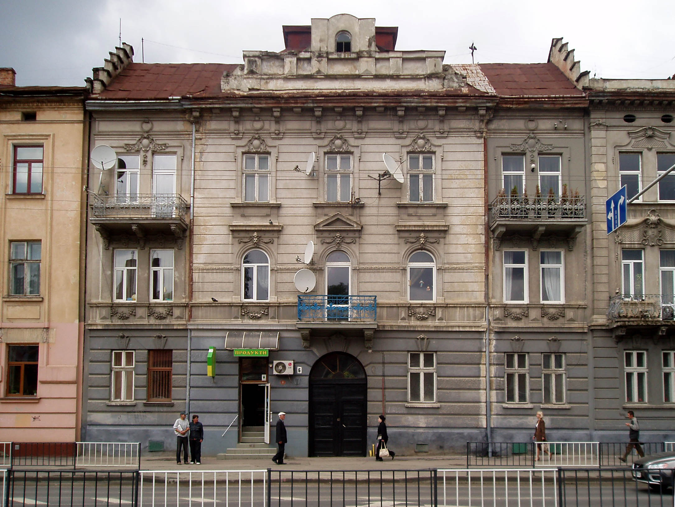 Дім № 6 на вулиці Сахарова у Львові.